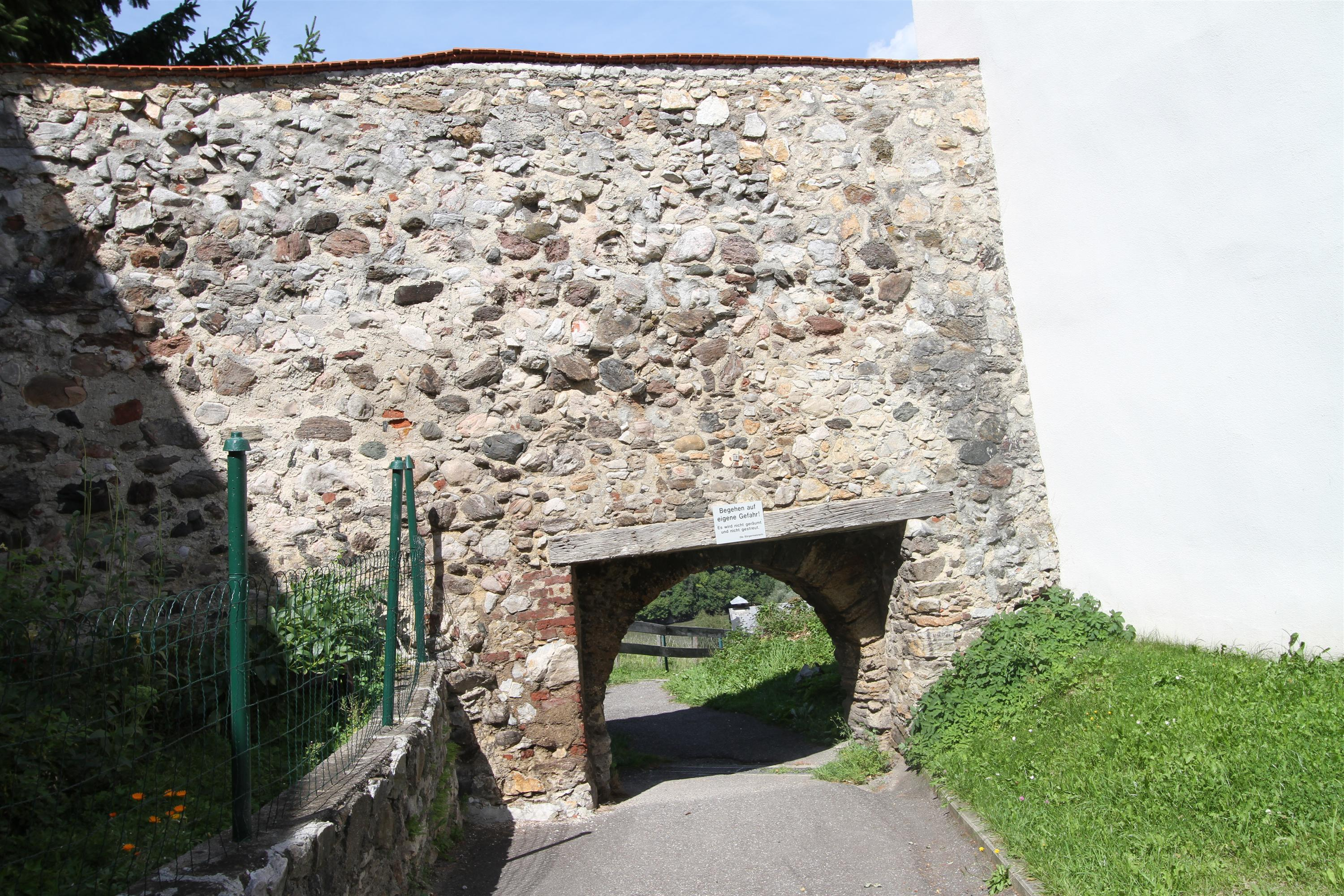 sog. Sautörl, Teil der Stadtbefestigung und Stadtmauer